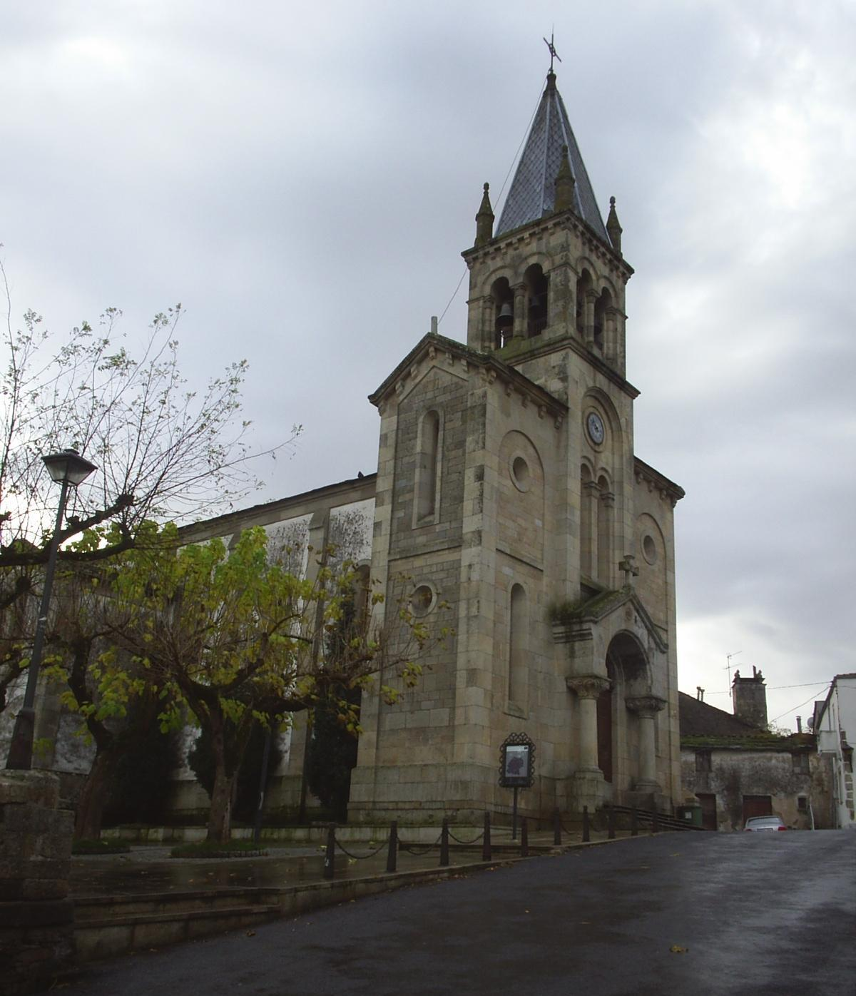 Iglesia de Santa Marina del municipio de Sarria escudo Origen/Source: Wikipedia, articulo sobre "Sarria" Autor/Author: Miguel Pereiro Copyright: GFDL (GNU Free Documentation License) Publicada por/Publish by: MPereiro Data/Date: 20 de noviembre de 2005 (20-11-2005) Otros datos/Other data: Categoría:España (imagen)